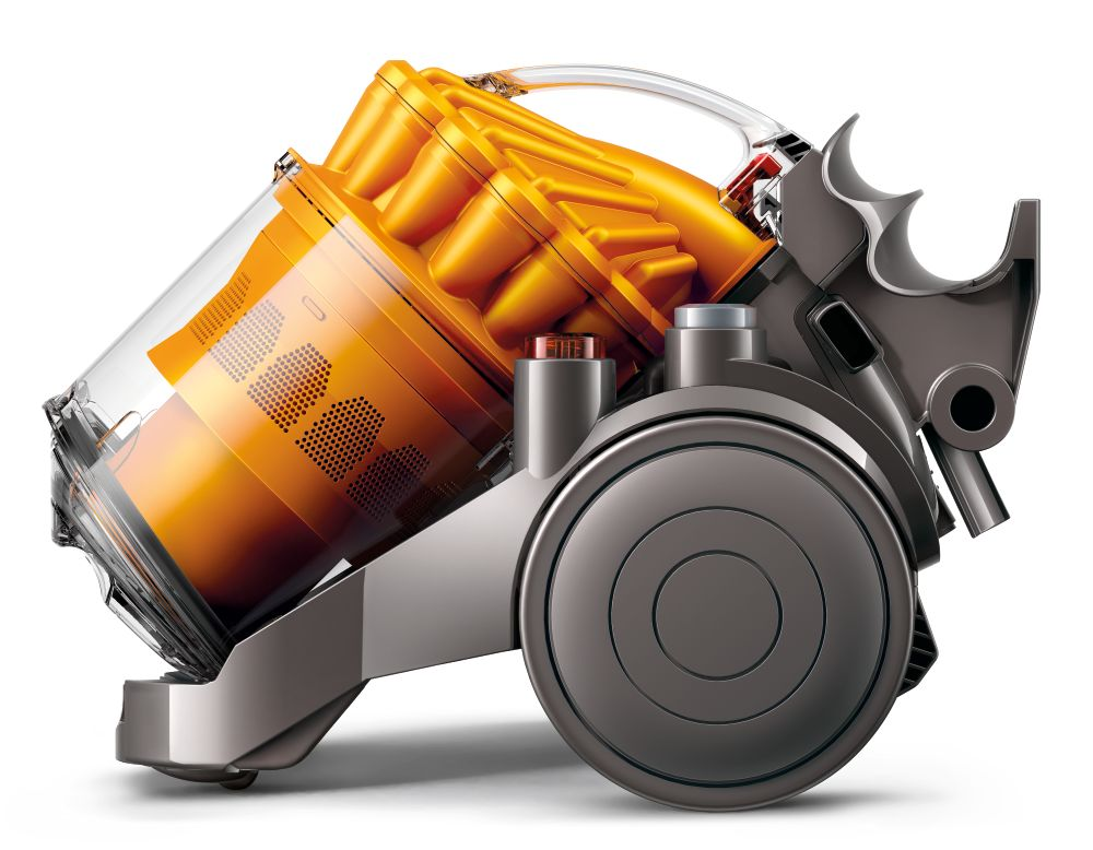 Пылесос Dyson модель DC32